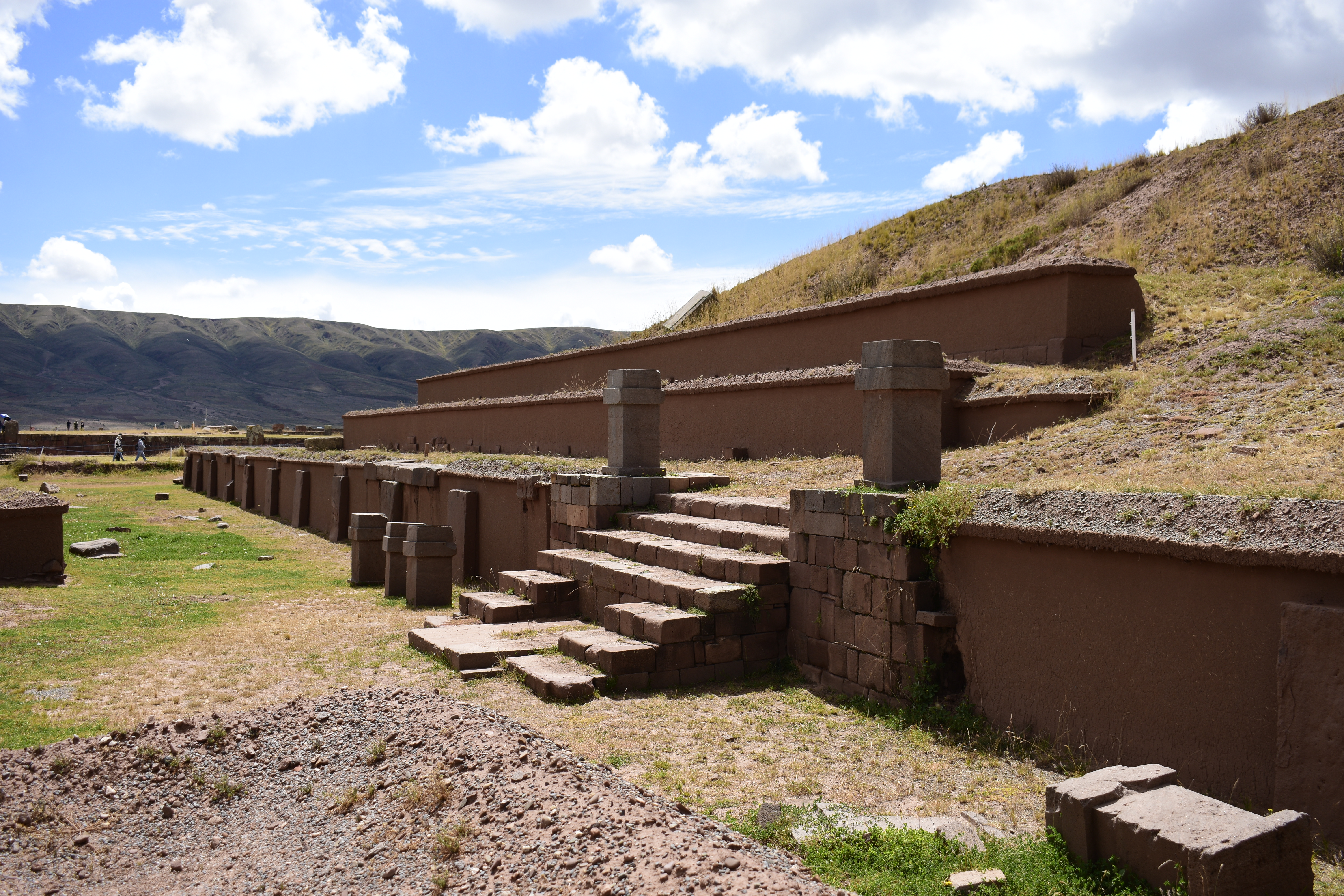 Sitio arqueológico Ruinas de Tiahuanacu This medium shows the protected monument with the number L/00-324 in Bolivia.